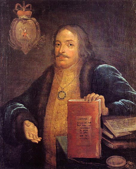 Князь Василий Голицын с наградной медалью. ГИМ. На портрете В.В. Голицын изображен с текстом «вечного мира» между Россией и Речью Посполитой, подписанного при его активном участии, и с «государевым золотым» на груди - воинской наградой, полученной за командование походом 1687 г. на Крымское ханство.